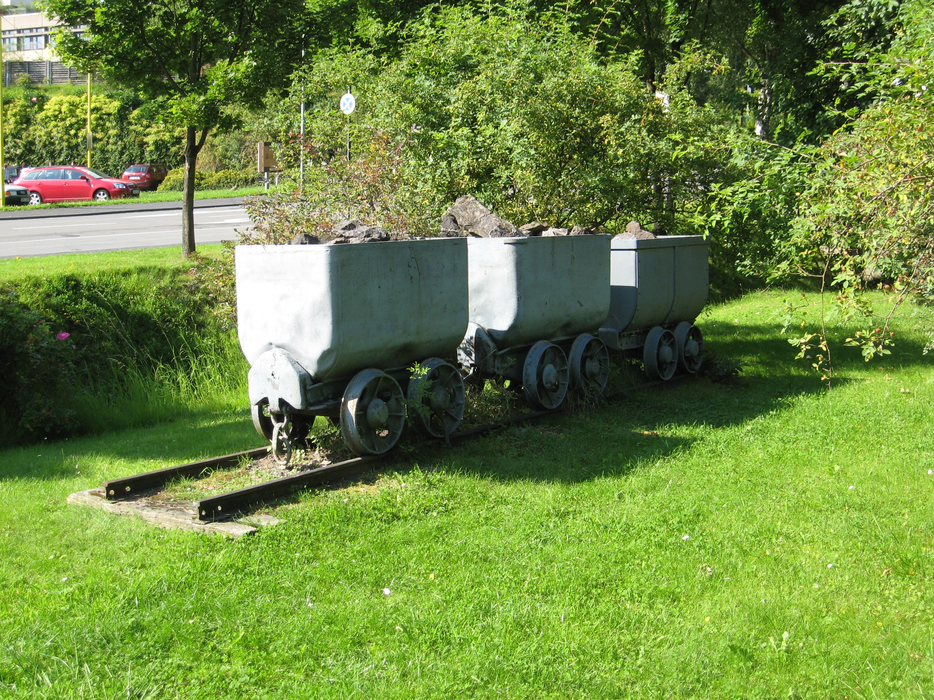 Hunte als Denkmal vor dem Kronprinz-Friedrich-Wilhelm-Erbstollen in Kreuztal-Ernsdorf, NRW.